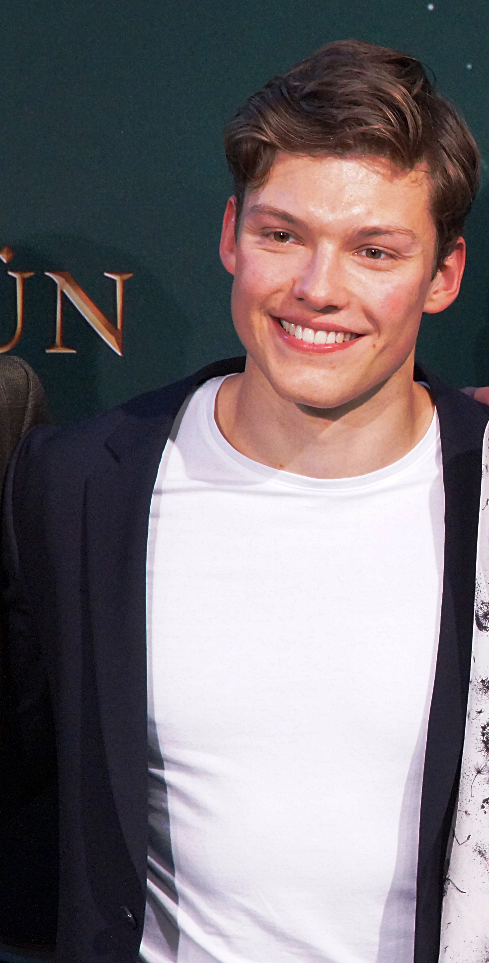 Lion Wasczyk bei der Deutschlandpremiere von 'Samaragdgrün', Köln, Juni 2016.